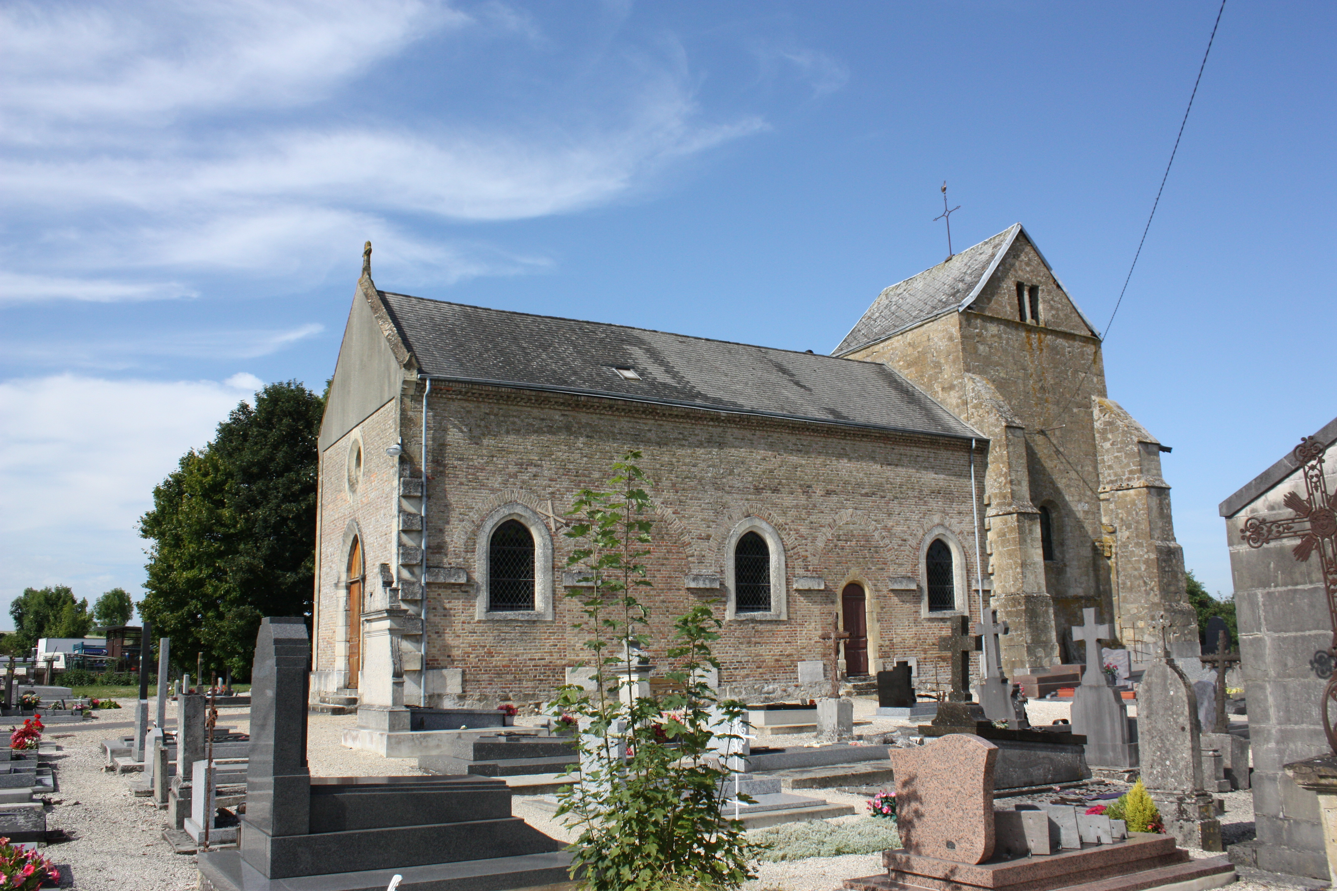 Village Ardennais